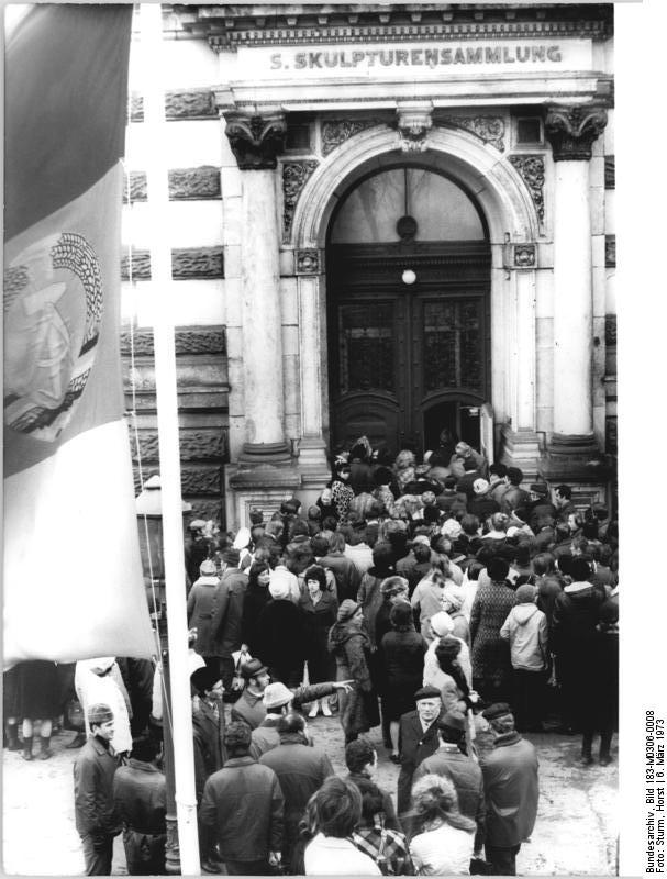 Dresden, Albertinum, Skulpturenausstellung ADN-ZB Sturm 6.3.1973 Dresden: VII. Kunstausstellung der DDR-Seit Eröffnung der VII. reißt der große Besucherstrom im Dresdner Albertinum nicht ab.